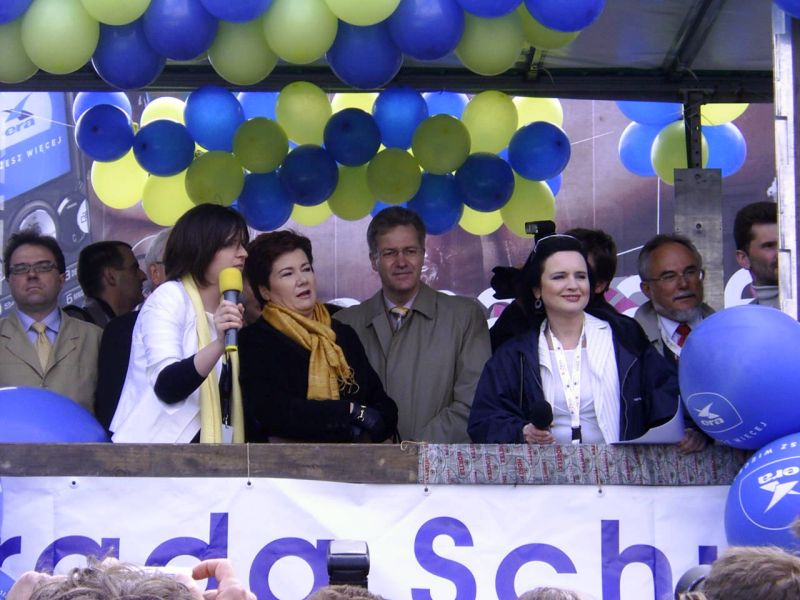 Hanna Gronkiewicz-Waltz (Parada Schumana Warszawa 2007)